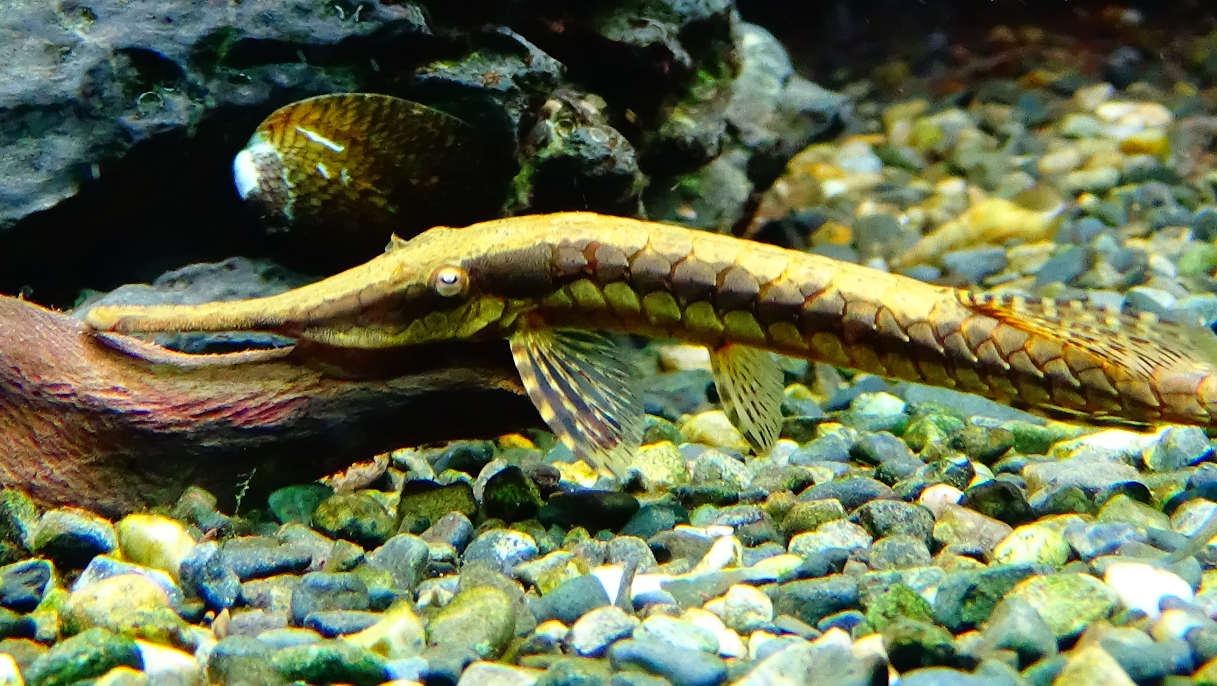 Farlowella acus - Aquarium Tropical du Palais de la Porte Dorée Paris/France - 05/2015